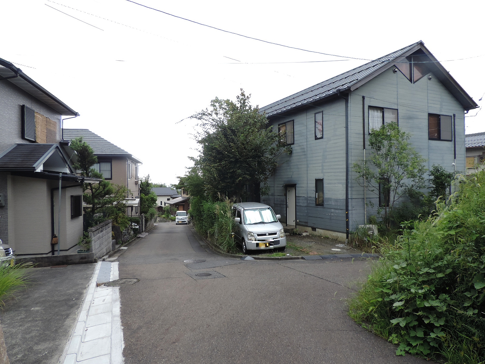 人形劇の図書館（右）。滋賀県大津市にて。2019年9月撮影。